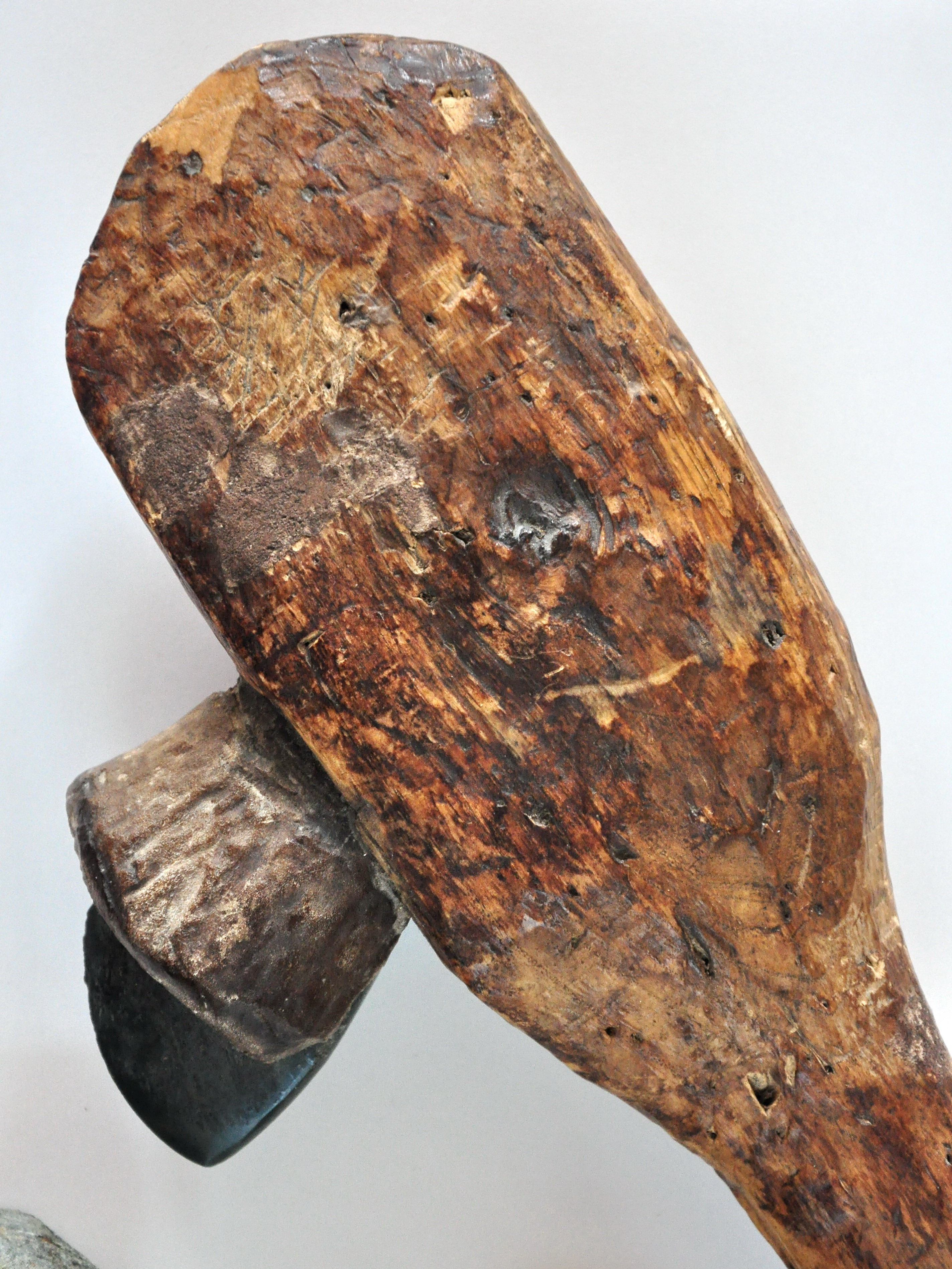 Fundstelle Seegubel (4. bis 3. Jahrtausend v.Chr.) in Kempraten (Switzerland) : Aussergewöhnlich sind Überreste der Steinbeilherstellung, darunter Abschläge, Stücke mit Sägeschnitten, Halbfabrikate und fertige Klingen, welche den Herstellungsprozesse aufzeigen. Zu den häufigsten Materialen gehören Grüngesteine und Serpentinite sowie Silex (Feuerstein) für Messer und Pfeilspitzen.